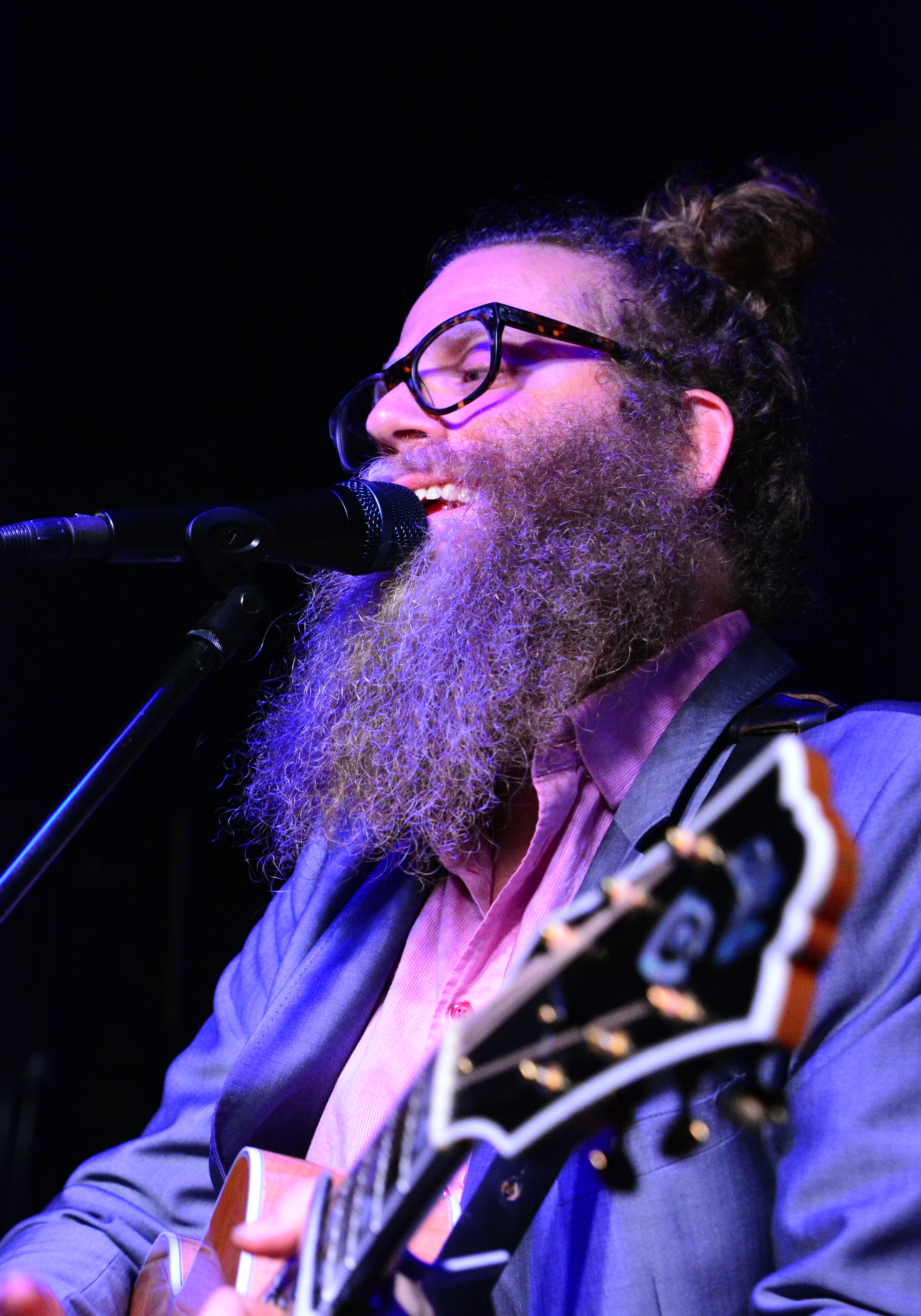 Ben Caplan im Nochtspeicher Hamburg 2016